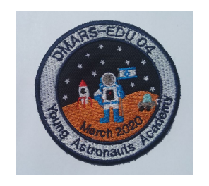 תגית המשימה (mission patch) עוצבה ע"י תלמידי בית הספר לאסטרונאוטים צעירים מחזור ג'. התגית נתפרה לסרבלים שהיו בשימוש במהלך המשימה.